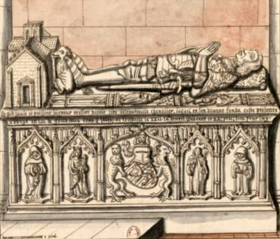 tombe de Nicolas_d'estouteville_relevée pour Gaignières, conservé à la BNF.